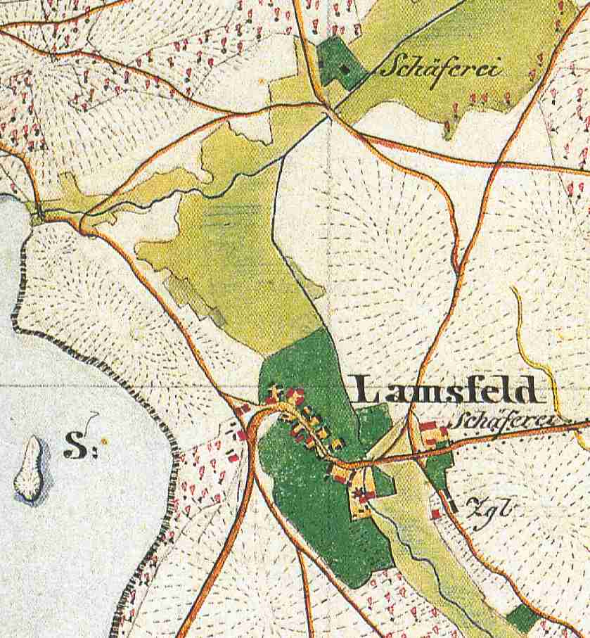 Lamsfeld, Gemeindeteil von Lamsfeld-Groß Liebitz, einem Ortsteil der Gemeinde Schwielochsee, Landkreis Dahme-Spreewald, Brandenburg, Deutschland, Ausschnitt aus dem Urmesstischblatt 4051 Lieberose von 1846